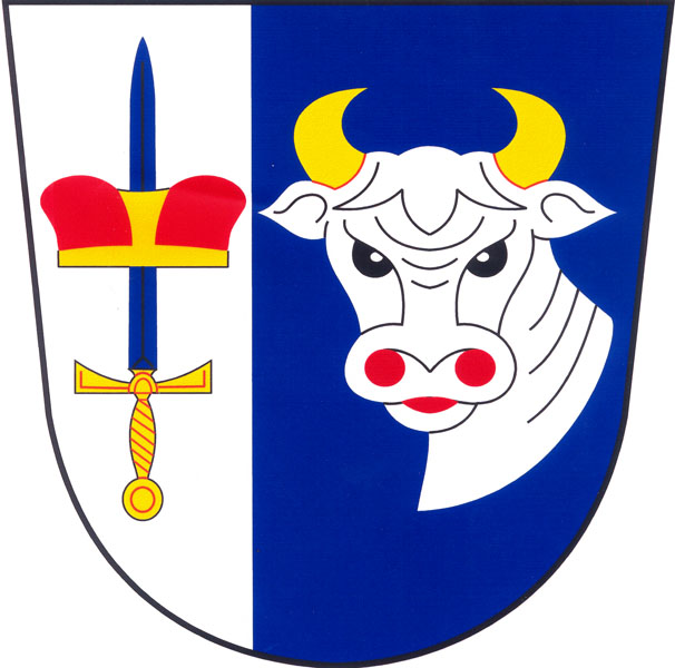 Znak obce Svinaře